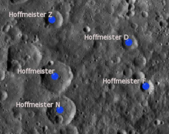 Cráter lunar. Hoffmeister. Cráteres satélite. (Imagen LRO)